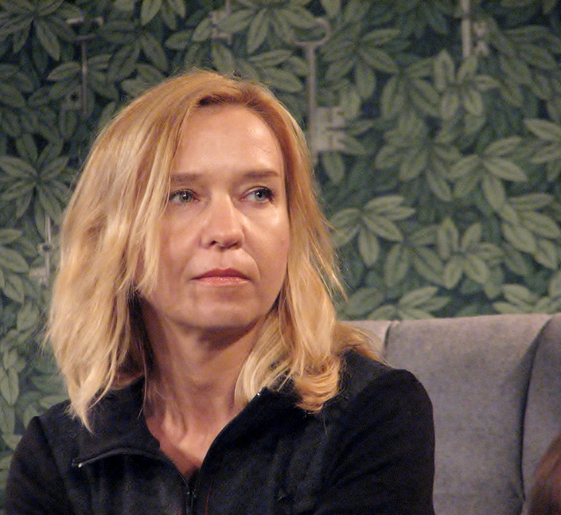 Triin Soomets esinemas kirjandusfestivalil HeadRead Tallinna kirjanike maja musta laega saalis